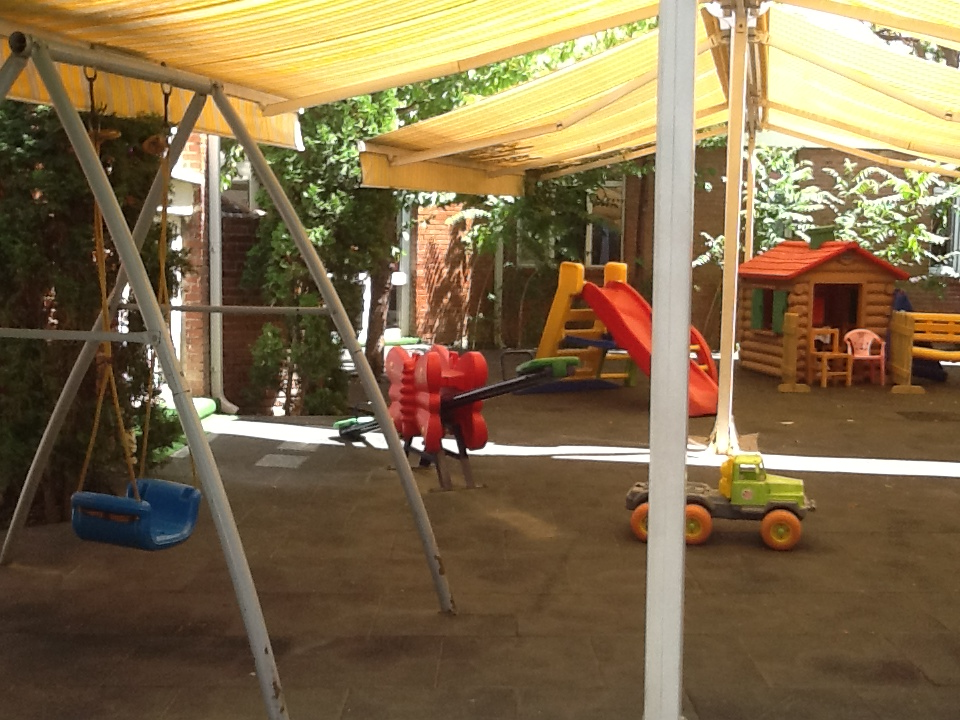 İÇEM İÇ BAHÇE